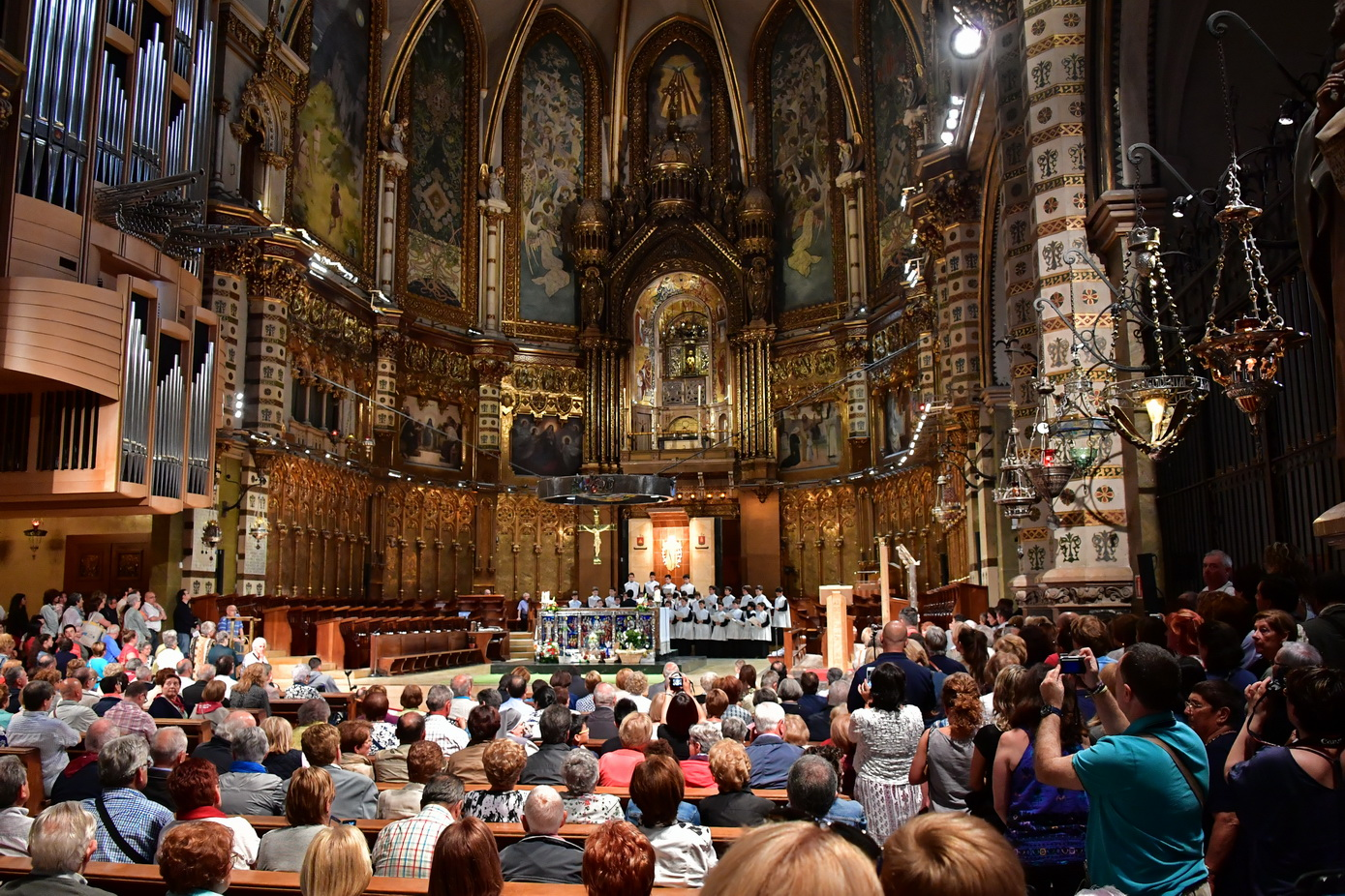 Messe in der Basilika von Monestir Santa Maria de Montserrat